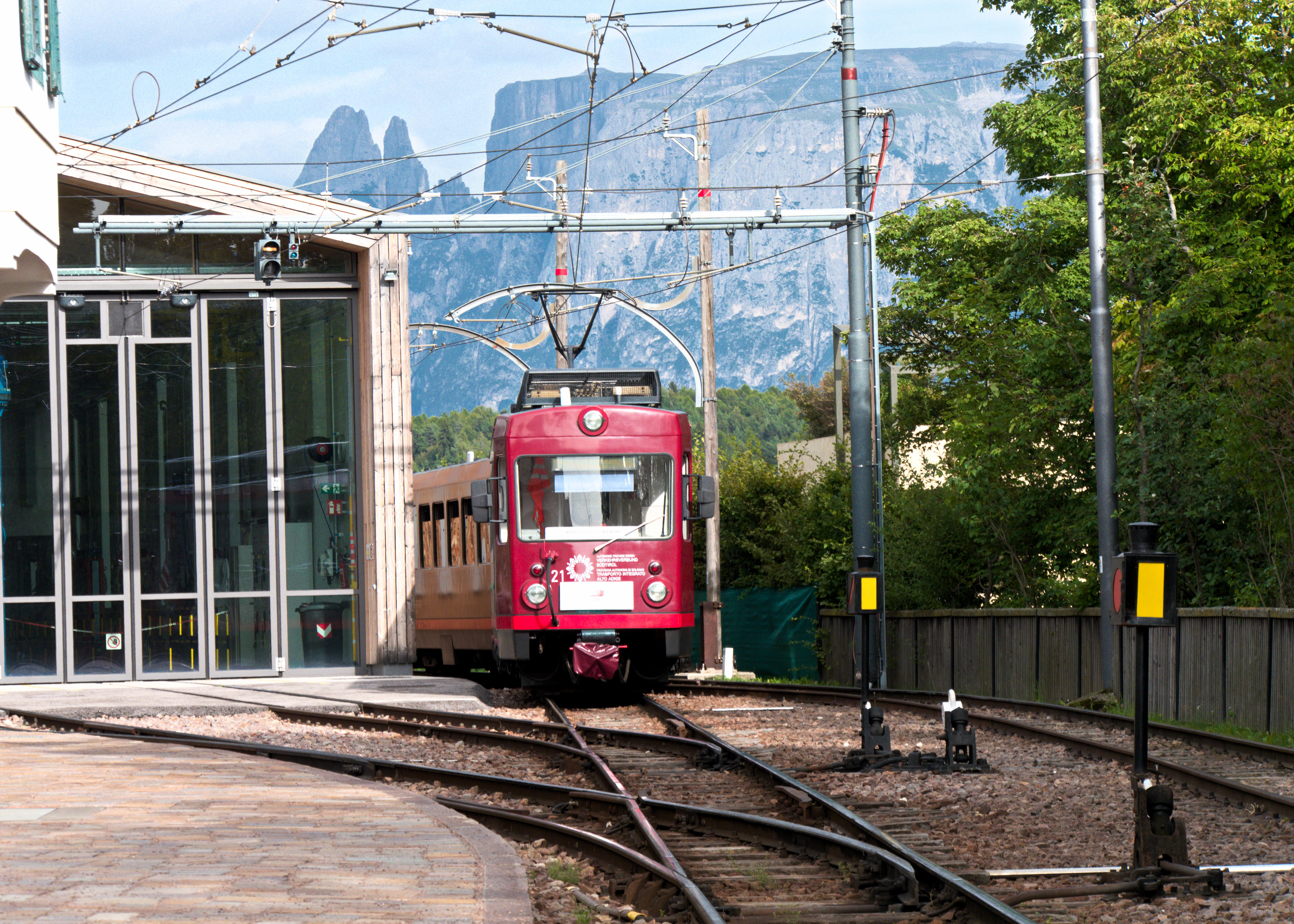 Die Rittner Bahn bei der Ausfahrt aus dem Bahnhof Oberbozen.